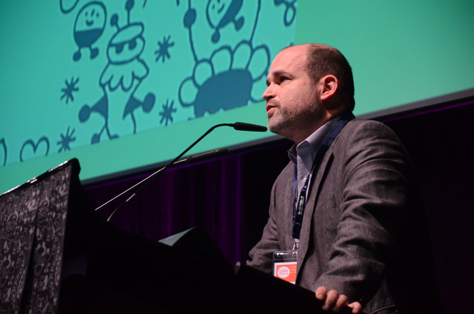 Sami Kanaan by Ivo Näpflin